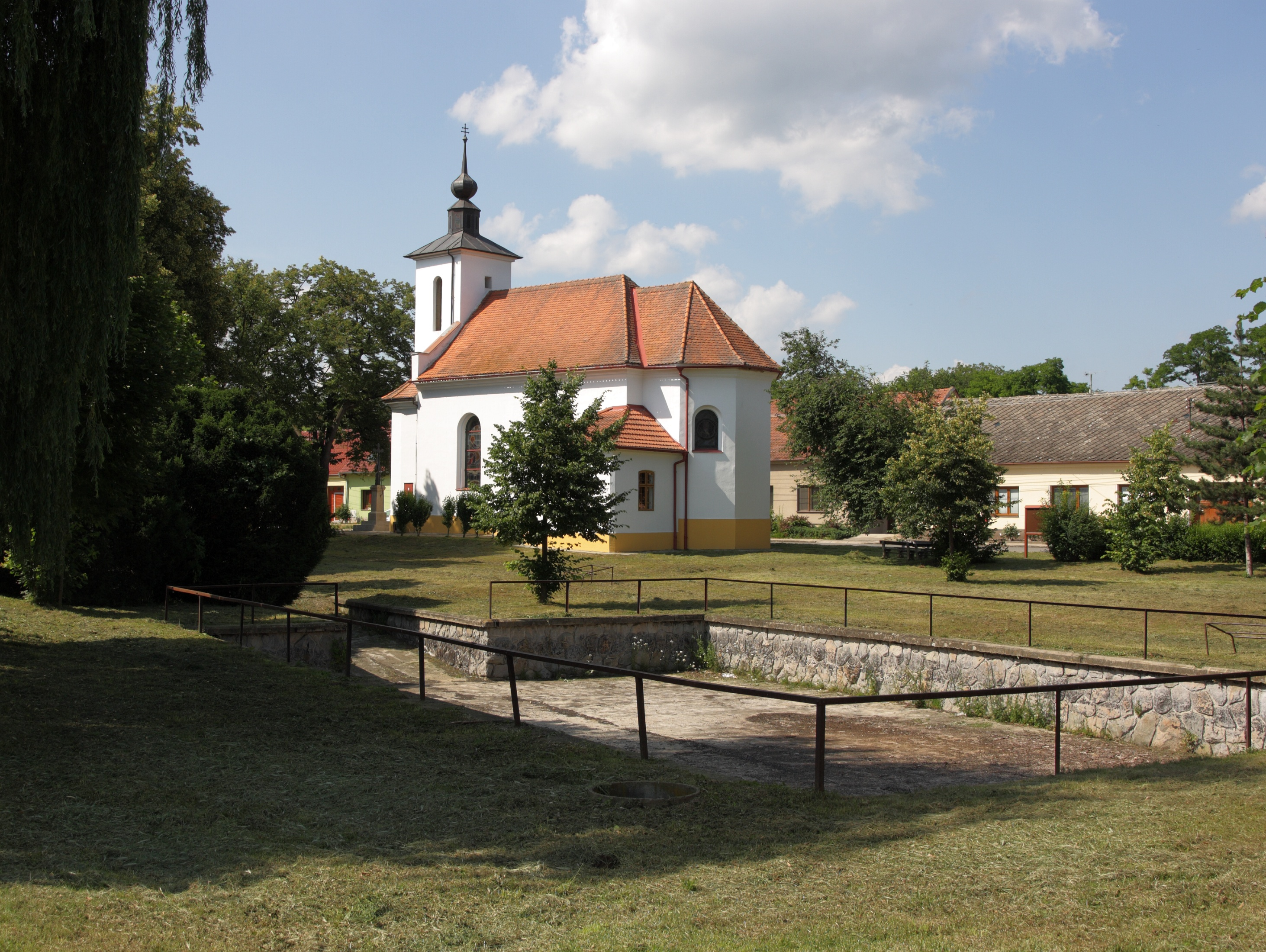 Mělčany - náves s kaplí.